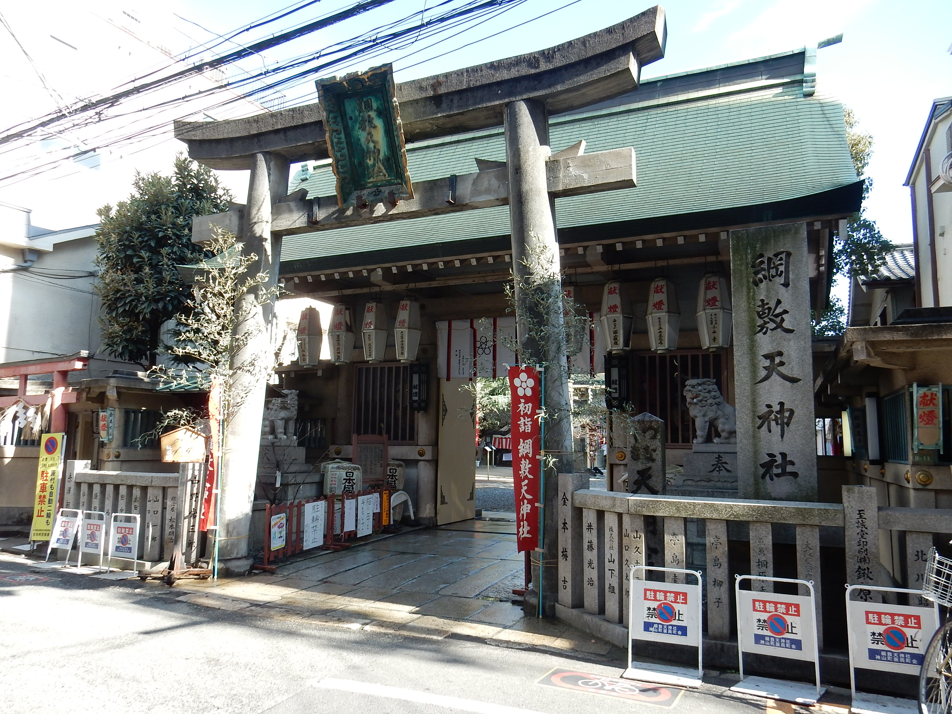 梅田の綱敷天満神社（正面）